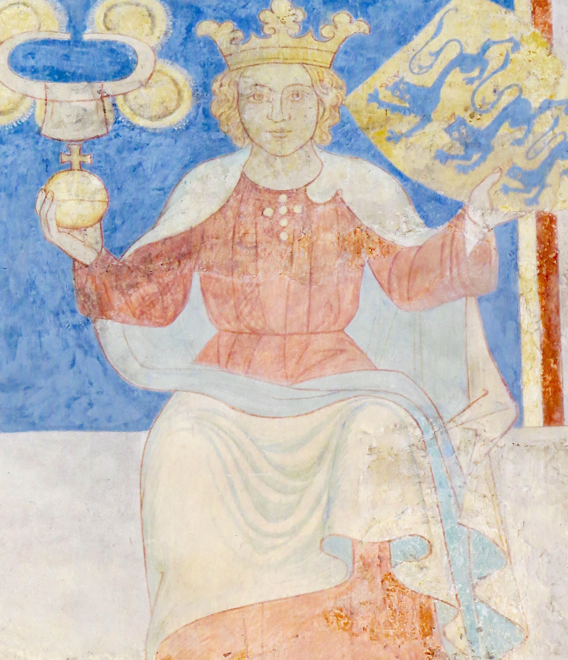 Valdemar den Unge, detalje fra Kongefrisen i Sankt Bendts Kirke, Ringsted, Sjælland